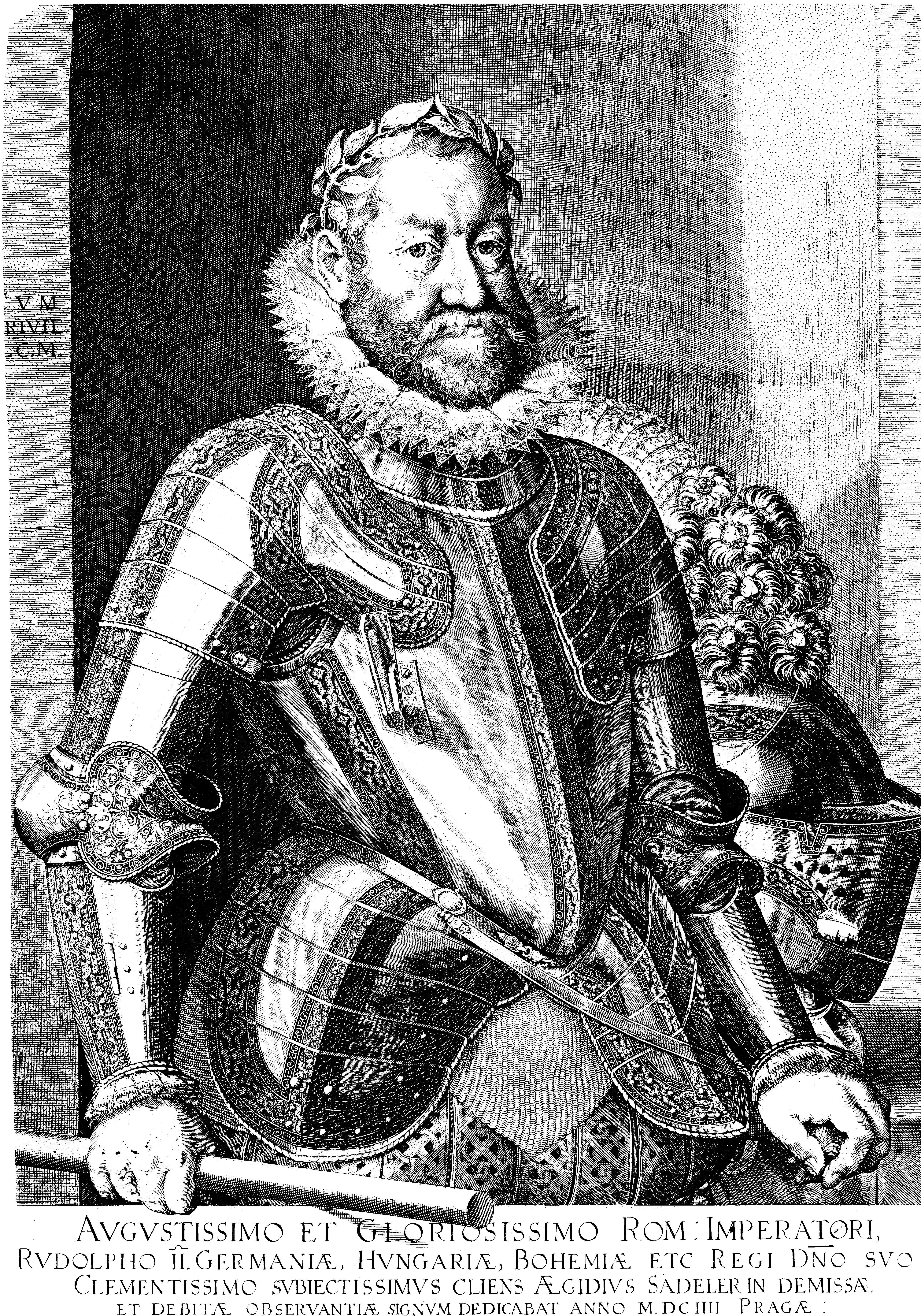 Portrait Kaiser Rudolf II. in Prag.